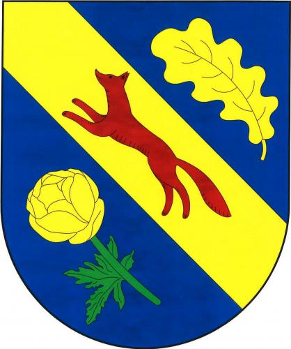 Skomelno znak